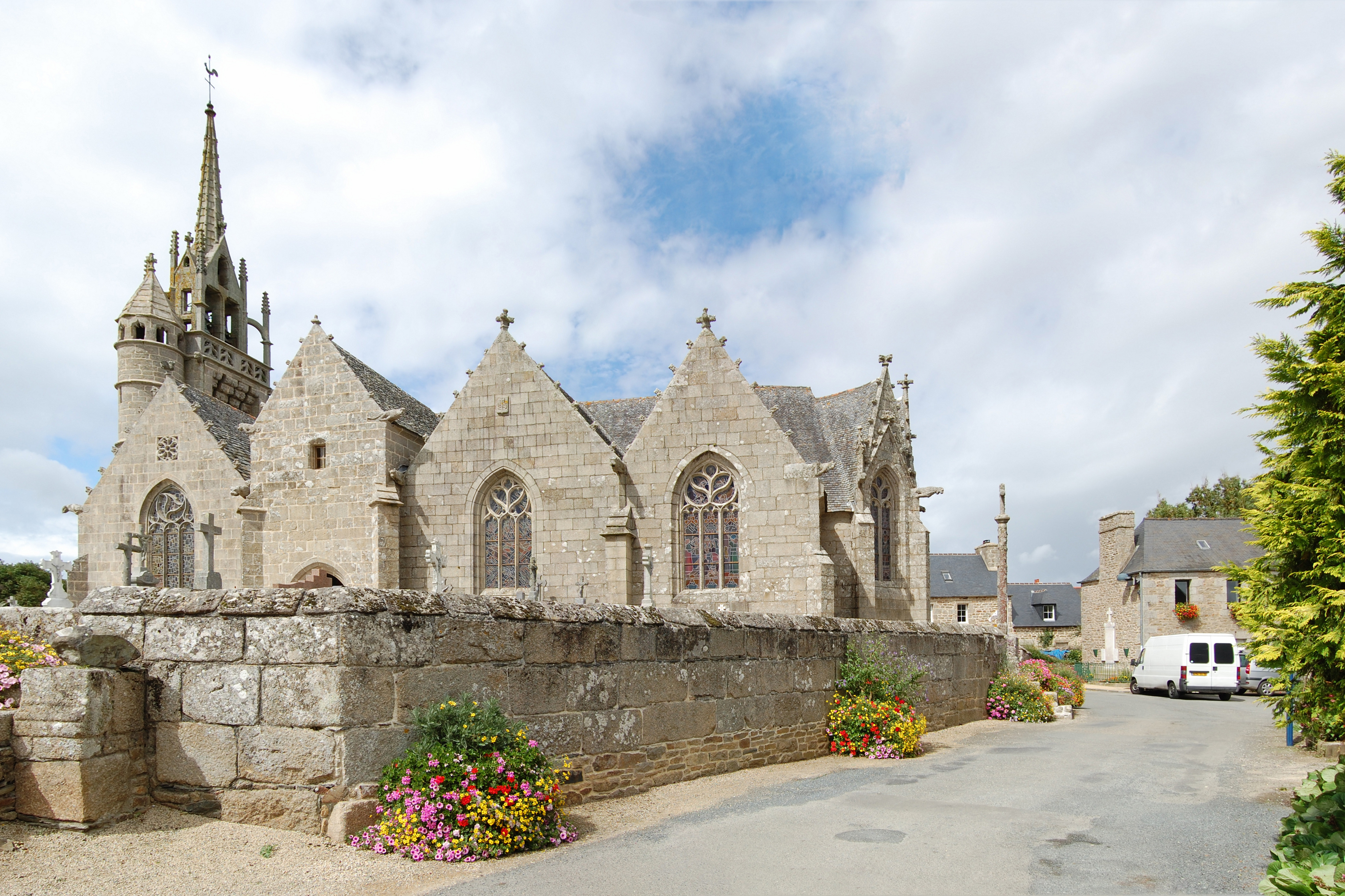 Enclos paroissial de Trédrez, France.